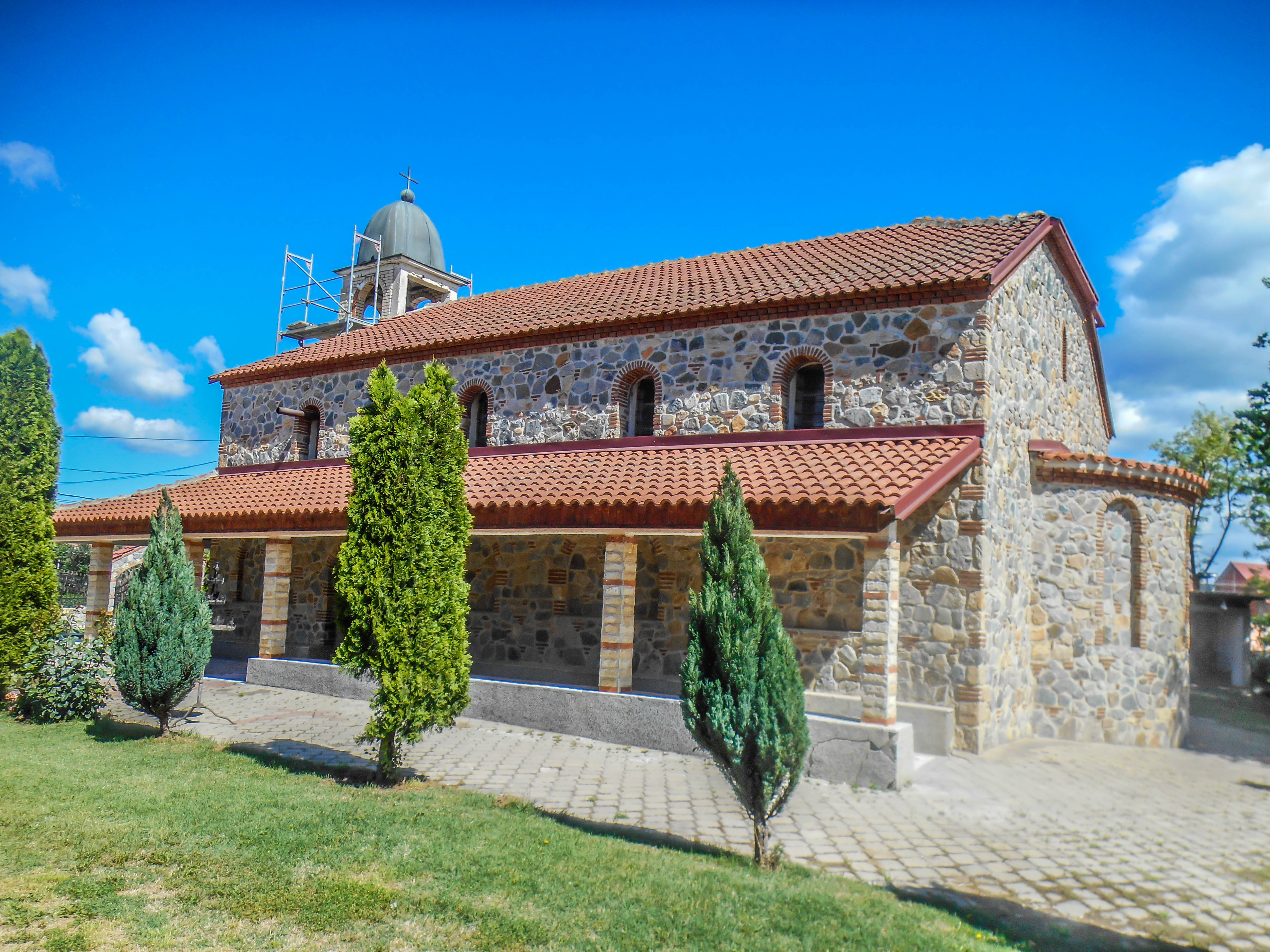 Црква „Успение на Пресвета Богородица“ - Василево